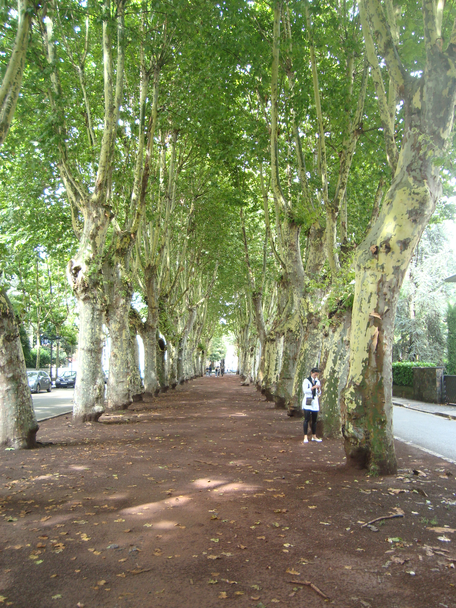 Plaça Clarà o Parc Vell